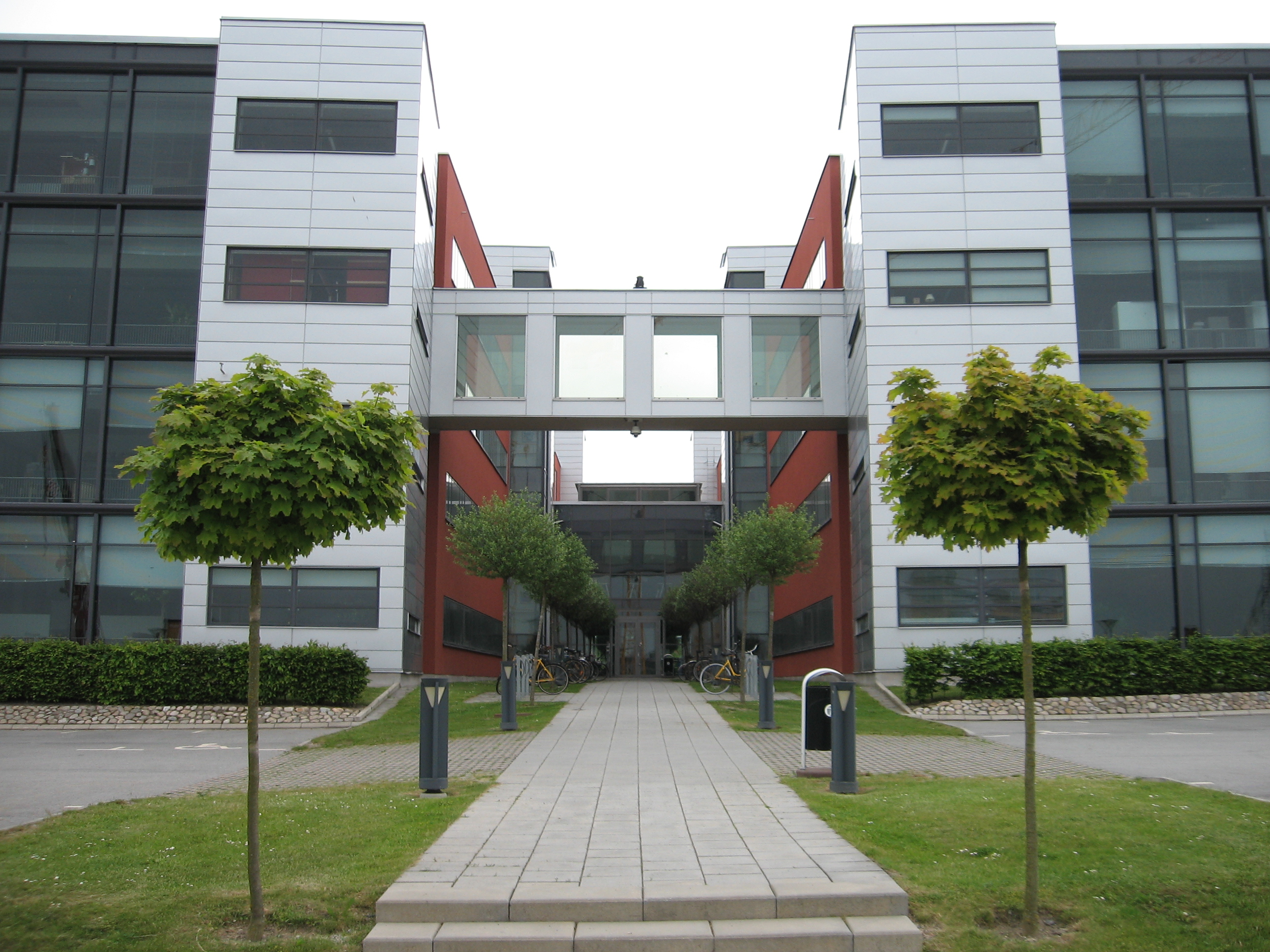 Edison Park i Lund.